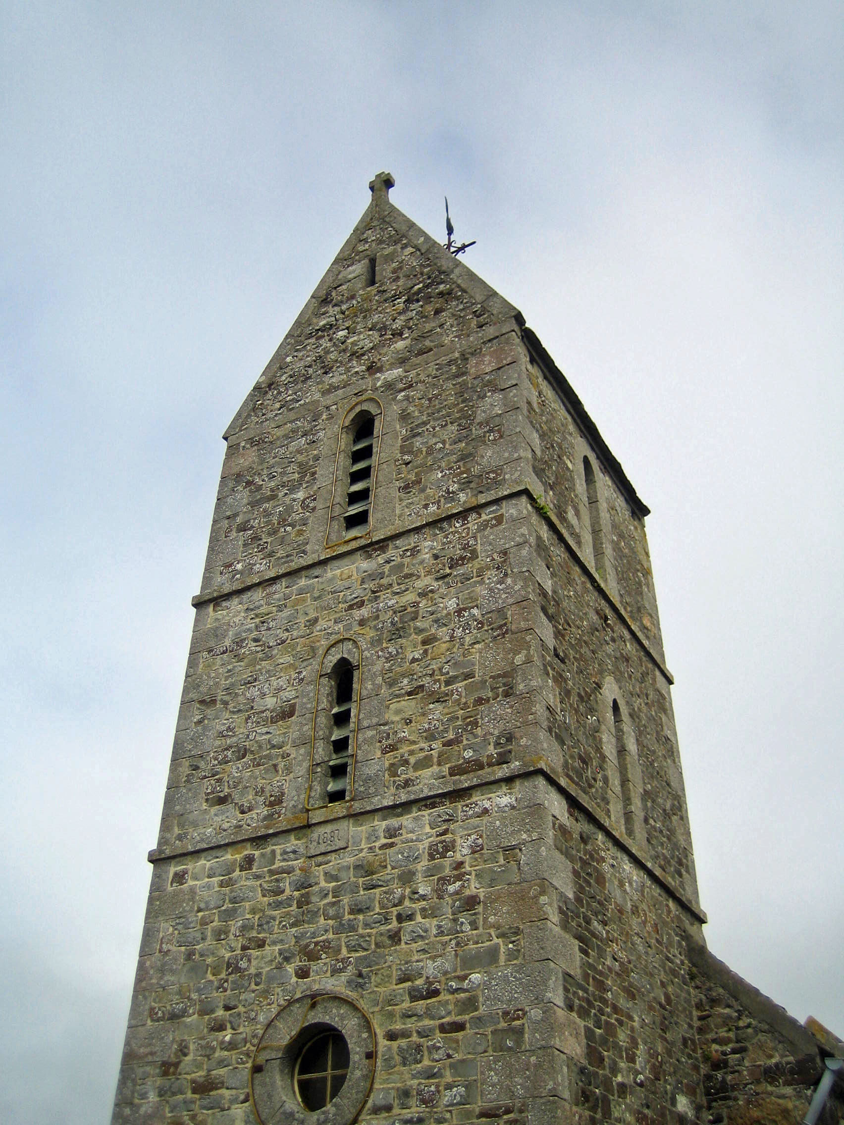 Église de Héauville.